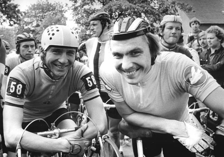 Hans-Joachim Hartnick, Aavo Pikkuus ADN-ZB Reiche 17.5.77-str Dresden: 30. Internationale Friedensfahrt . Nicht erst seit der Jubiläumsfahrt kennen sich der Träger des Gelben Trikots Aavo Pikkuus aus der UdSSR (r.) und der Kapitän der DDR-Friedensfahrtmannschaft,Hans-Joachim Hartnick. Bereits im vergangenen Jahr, als Hartnick Sieger der Fahrt wurde lernten sie sich als gute Sportskameraden kennen.